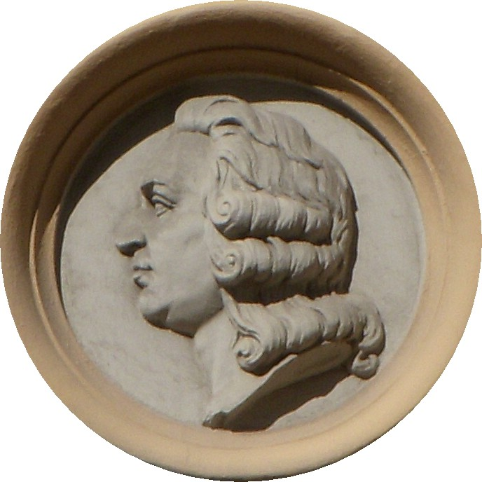 Medaljong av Cronstedt på Gamla Jernkontorets hus på Norrmalm i Stockholm